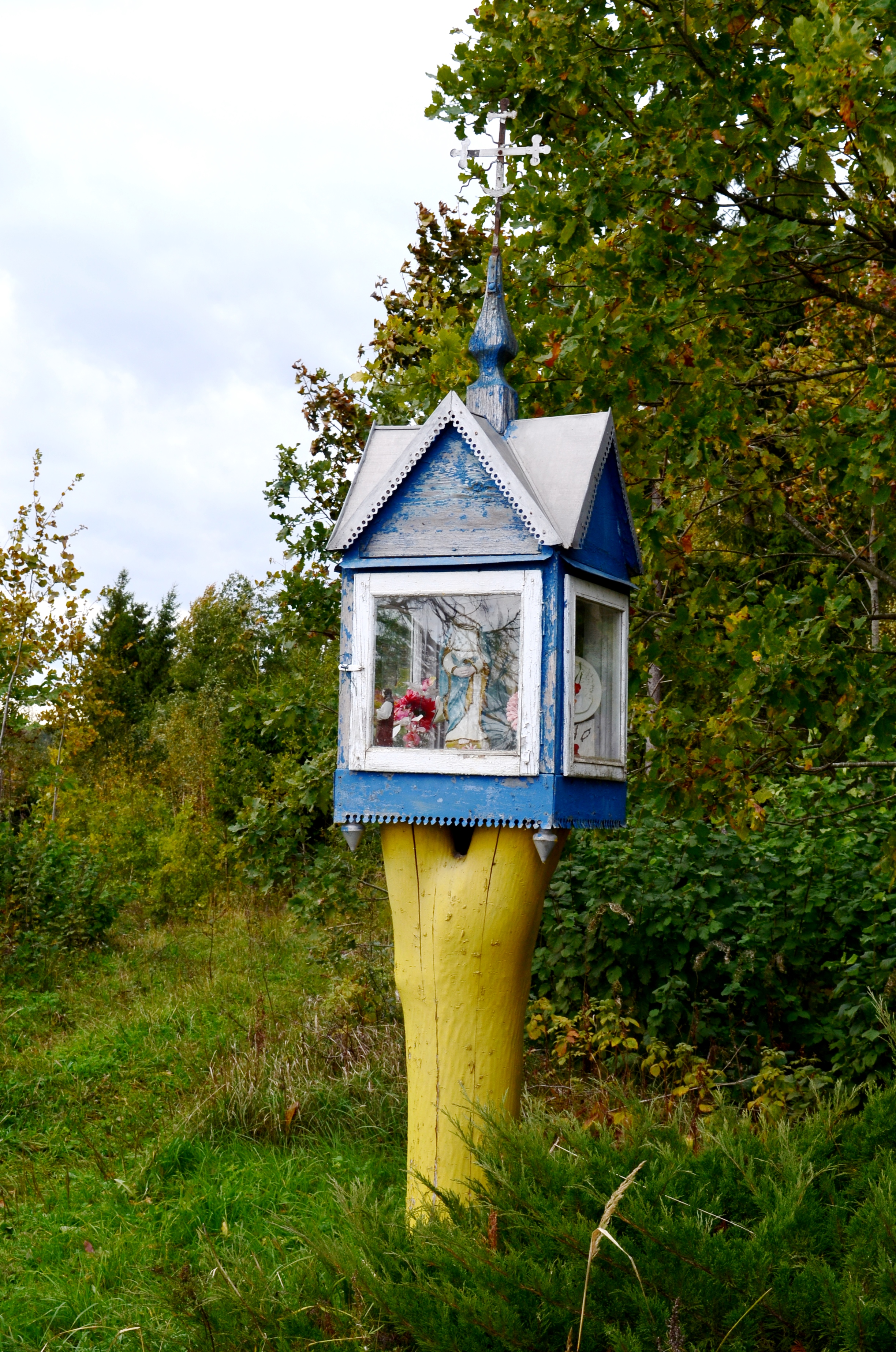 Koplytėlė, Rešketėnai, Rietavo sav.